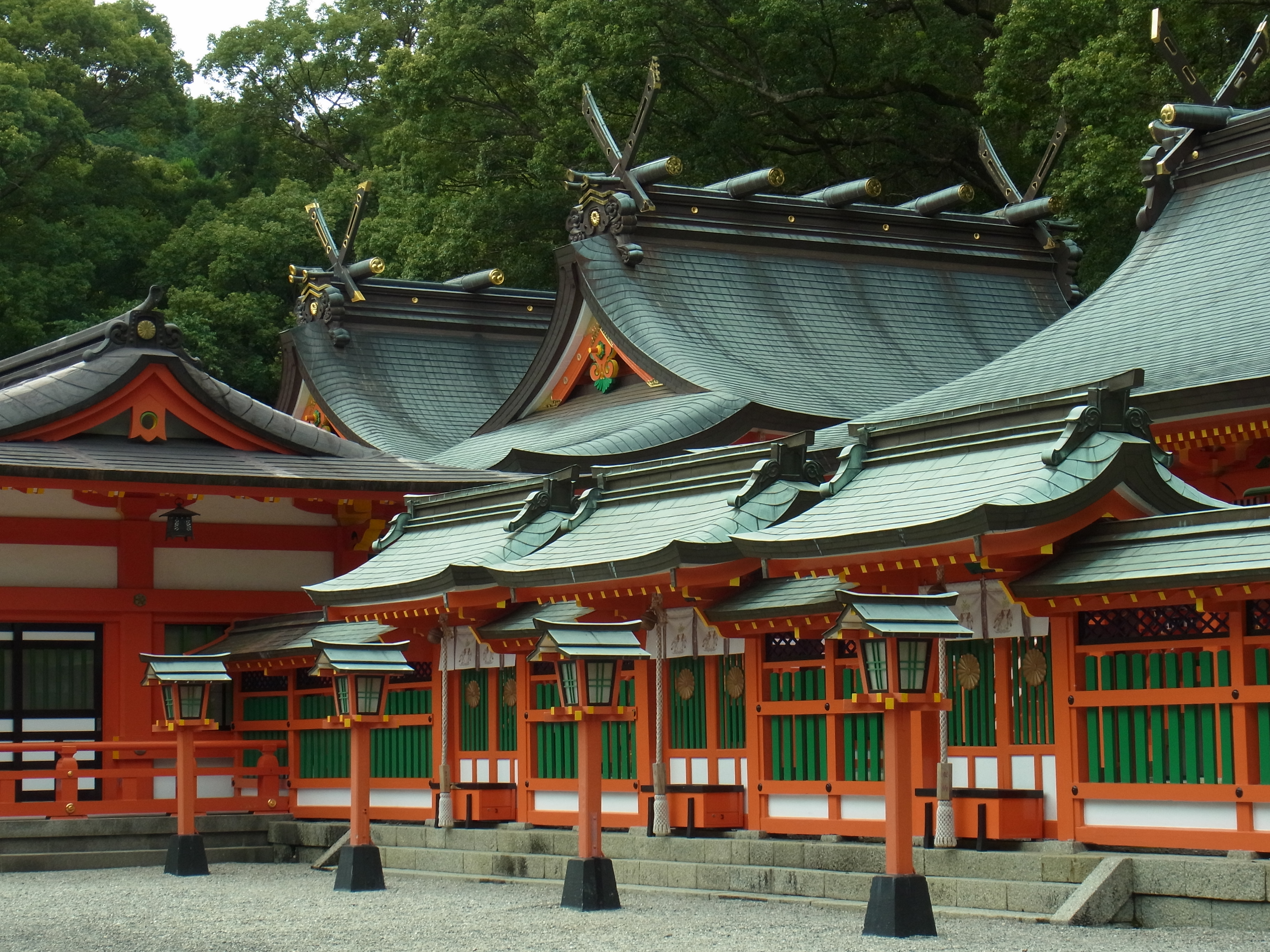 新宮市にて 熊野速玉大社 2012.8.22